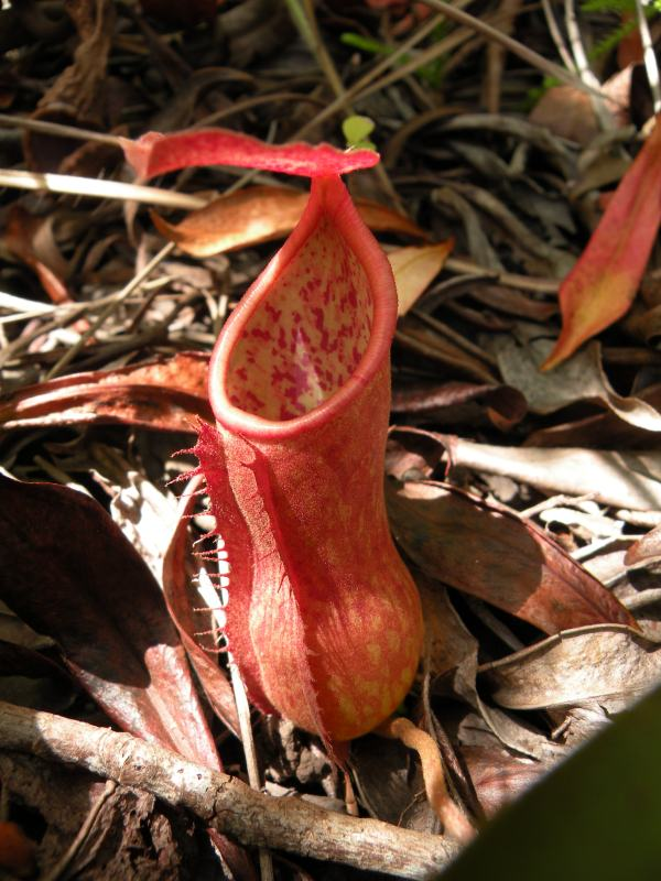 Nepenthes kongkandana